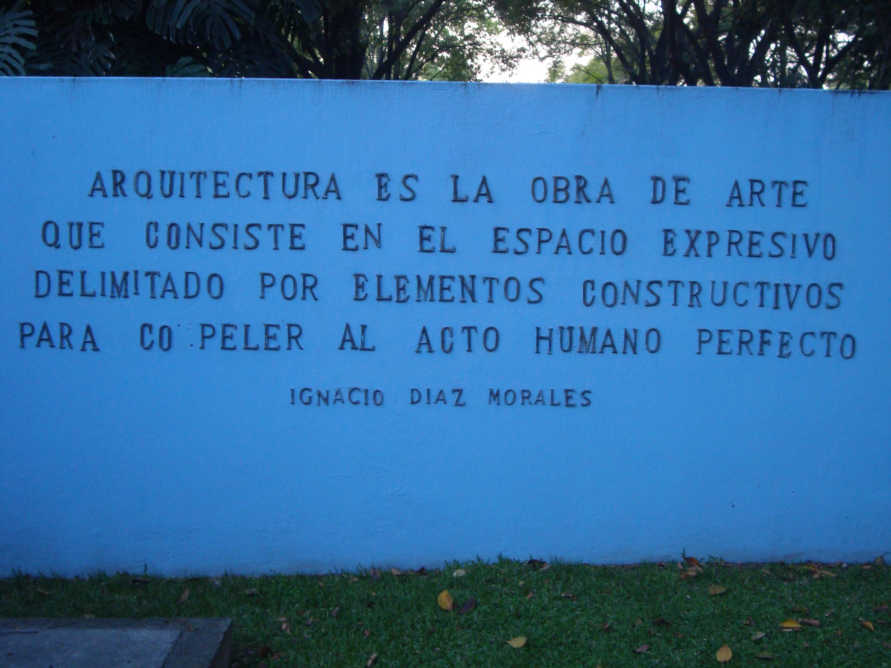 Frase de Diaz Morales. ITESO, Guadalajara